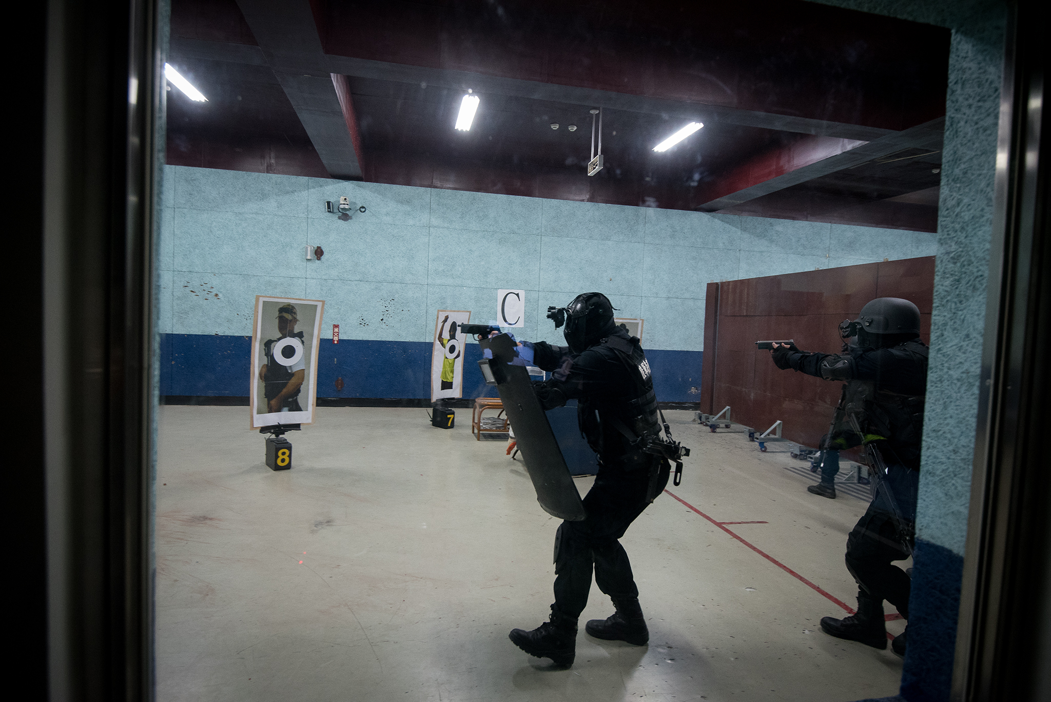 文言: 07.20 總統視導陸軍航特部高空特種勤務中隊，以及各項戰技操演